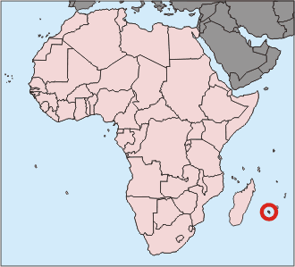 Landkarte Afrikas